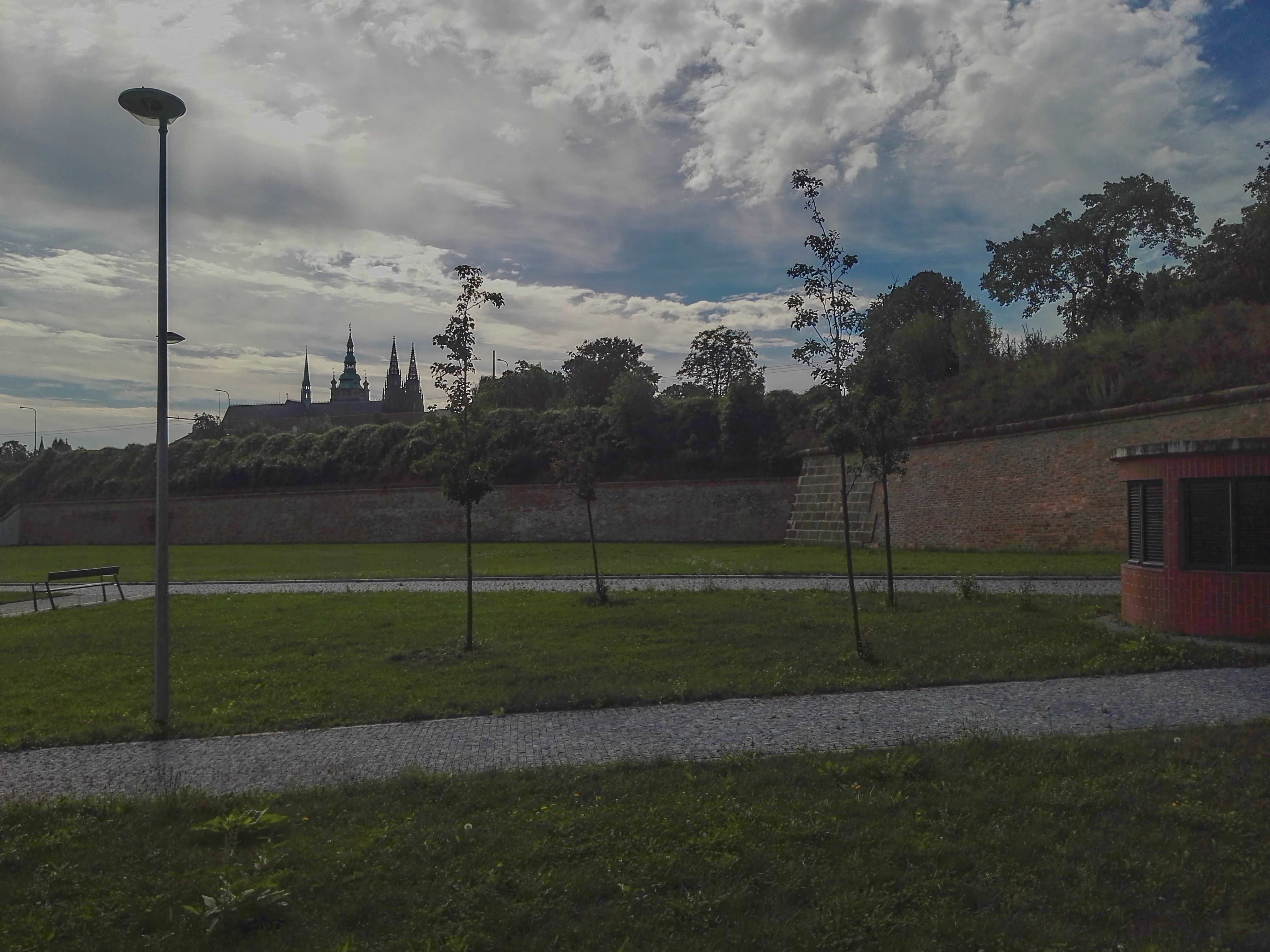 Praha, park Marie Terezie na Hradčanech, pohled přes park ke katedrále sv. Víta